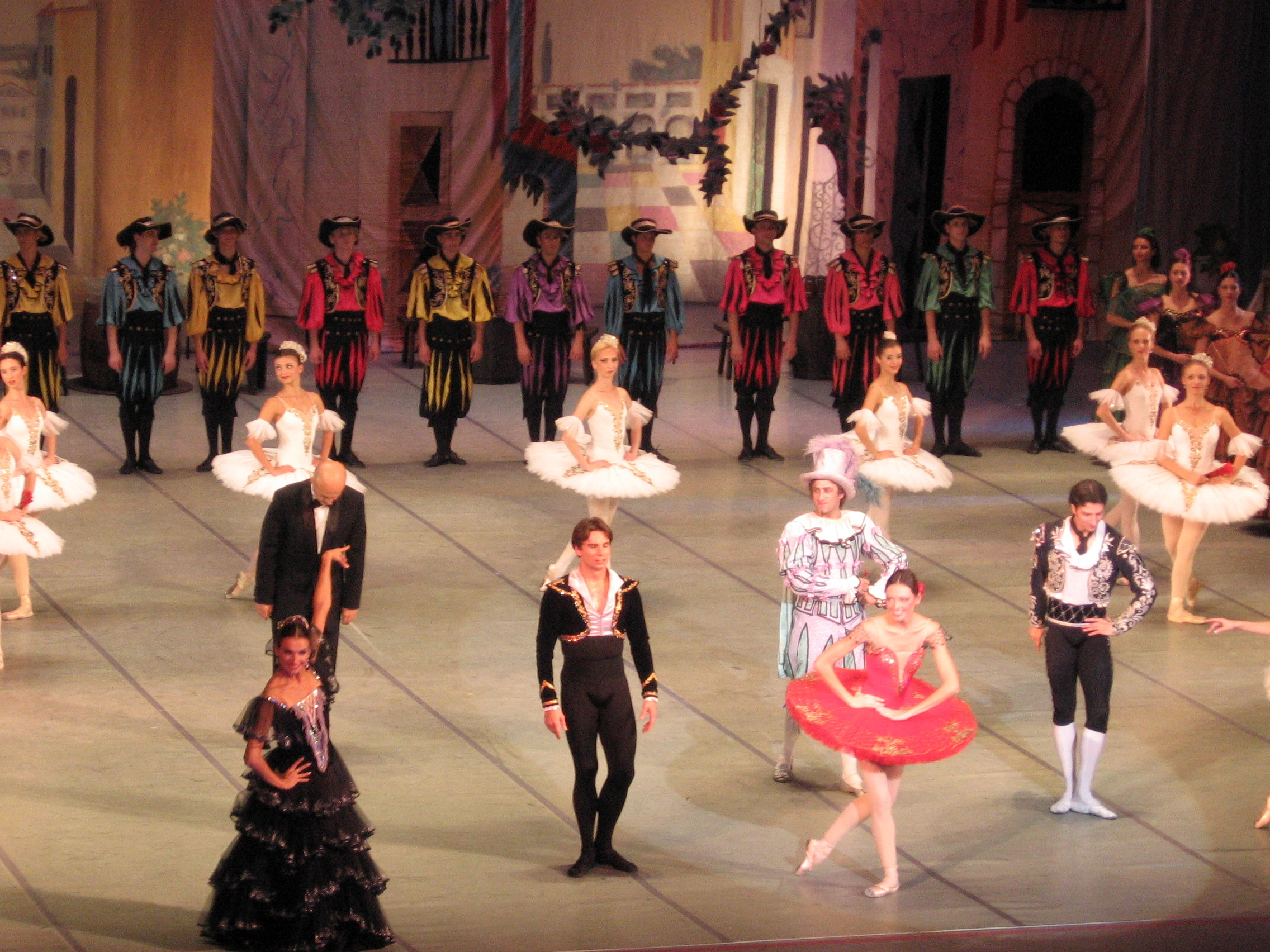 Балет Дон Кихот на сцене театра. 25-09-2011